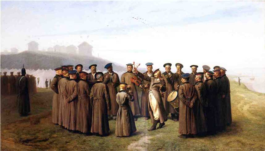 "Отдых в русском лагере" - жанровая картина Ж. Жерома